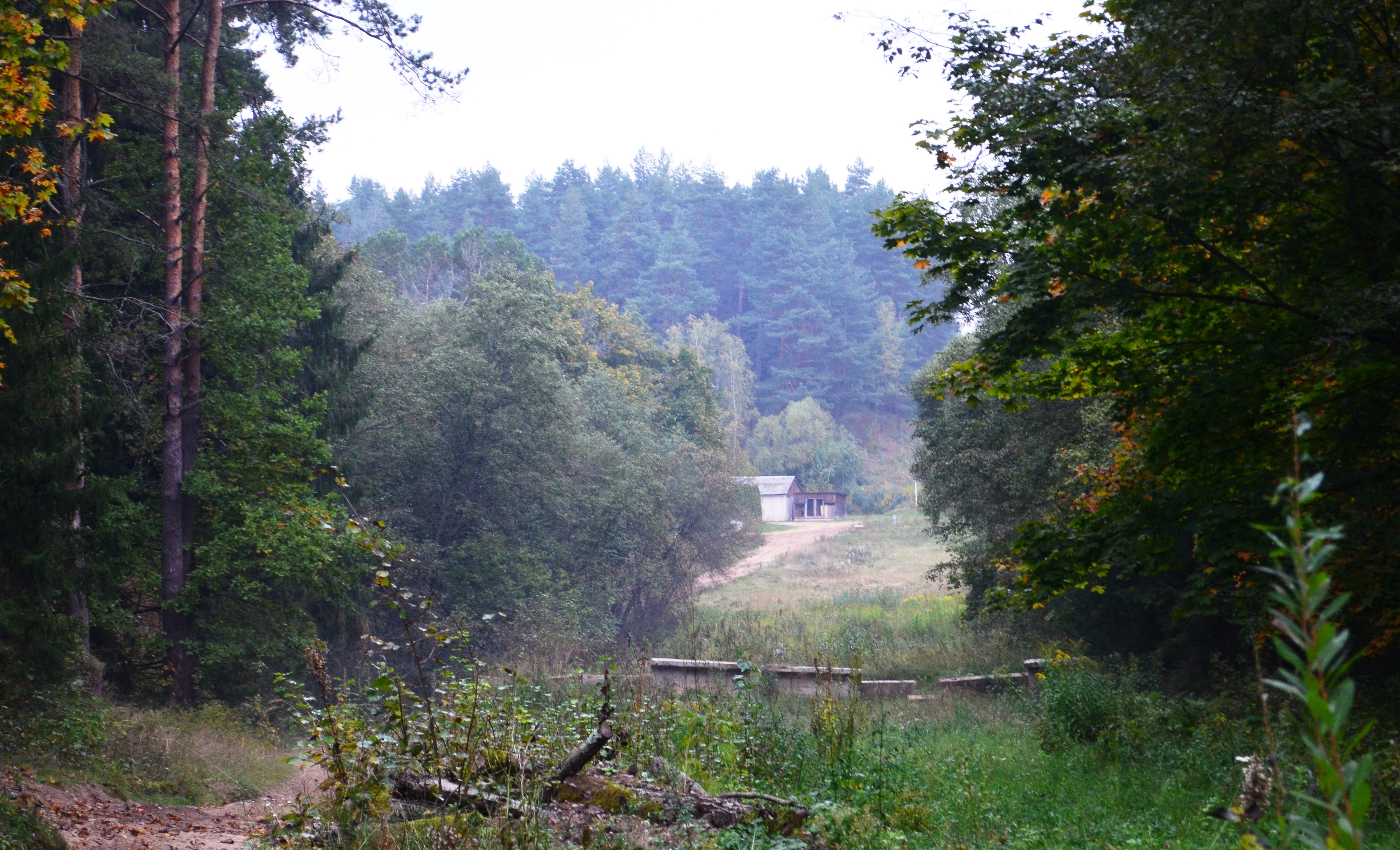 Žemoji Veržuva, Vilnius